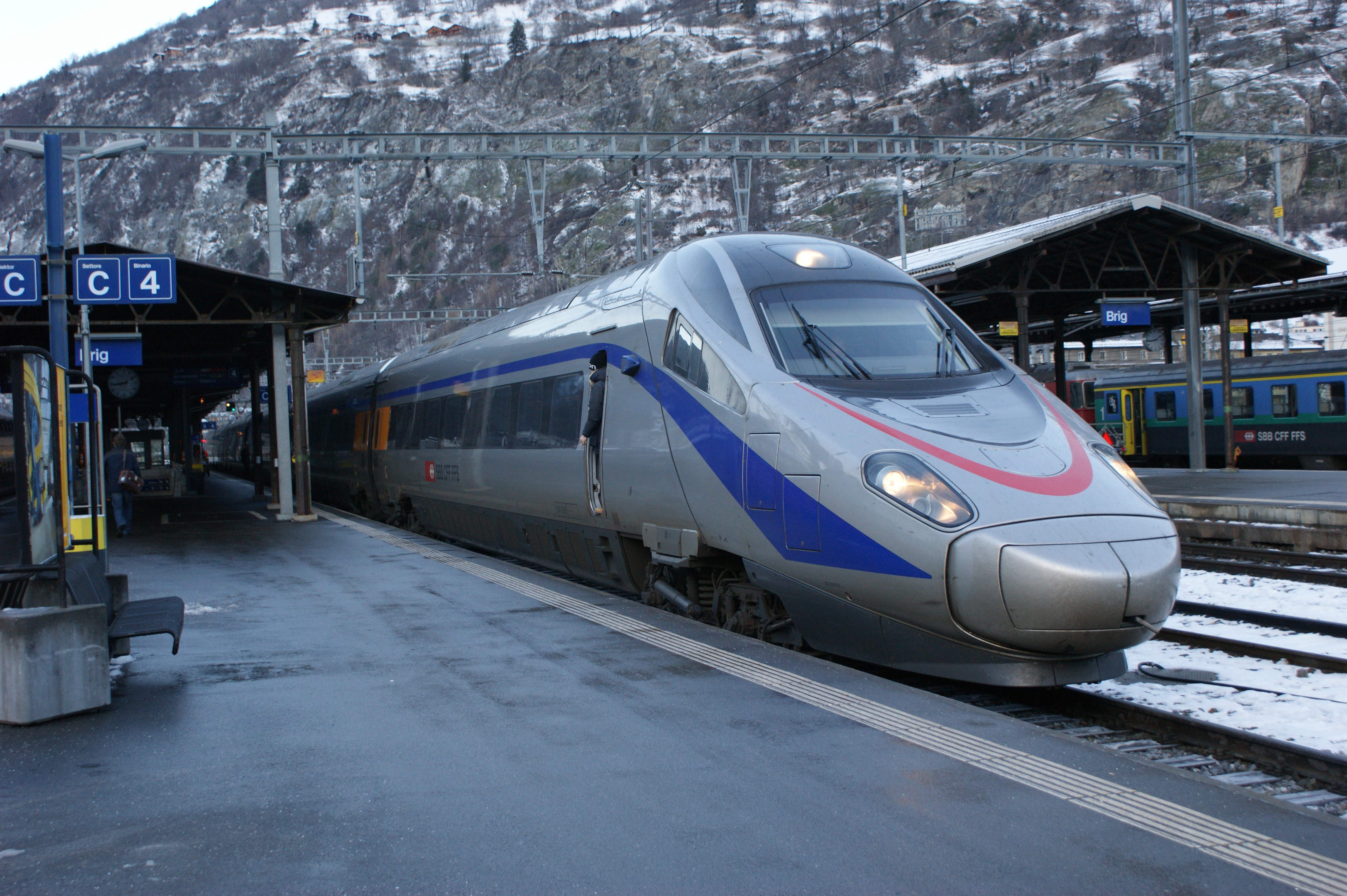 ETR 610.006 der SBB im Fahrplaneinsatz Basel—Milano abfahrbereit in Brig